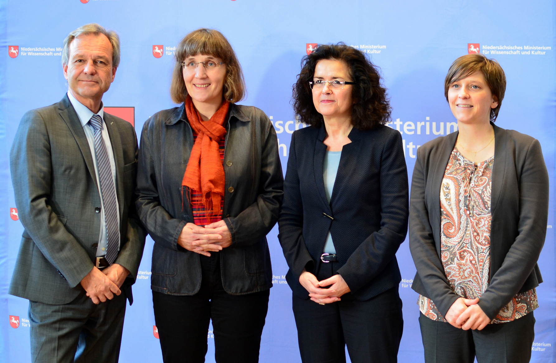 Preisträger des Wissenschaftspreises Niedersachsen mit der niedersächsischen Ministerin für Wissenschaft und Kunst Gabriele Heinen-Kljajić, von links: Karsten Danzmann, Kathrin Kiehl, Gabriele Heinen-Kljajić, Sarah Verhulst